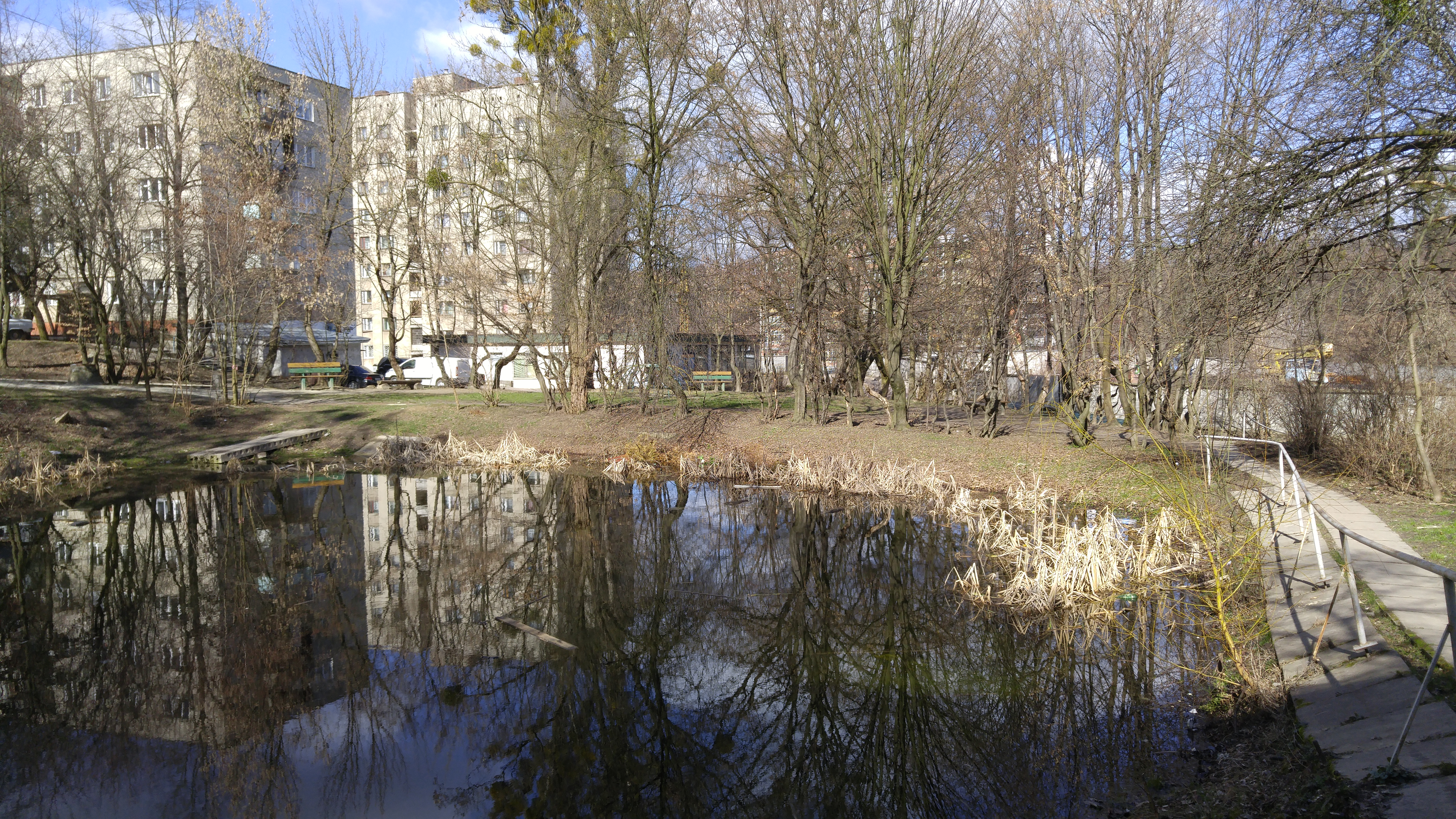 Ставок при вул.Тернопільській, 1. Львів.